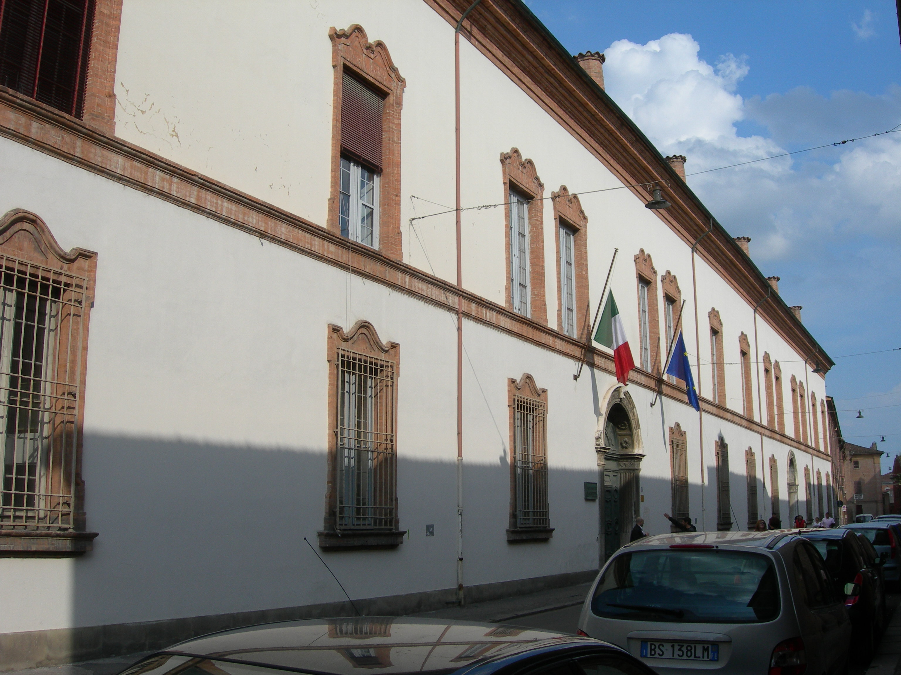 Palazzo dell'Università di Ferrara.